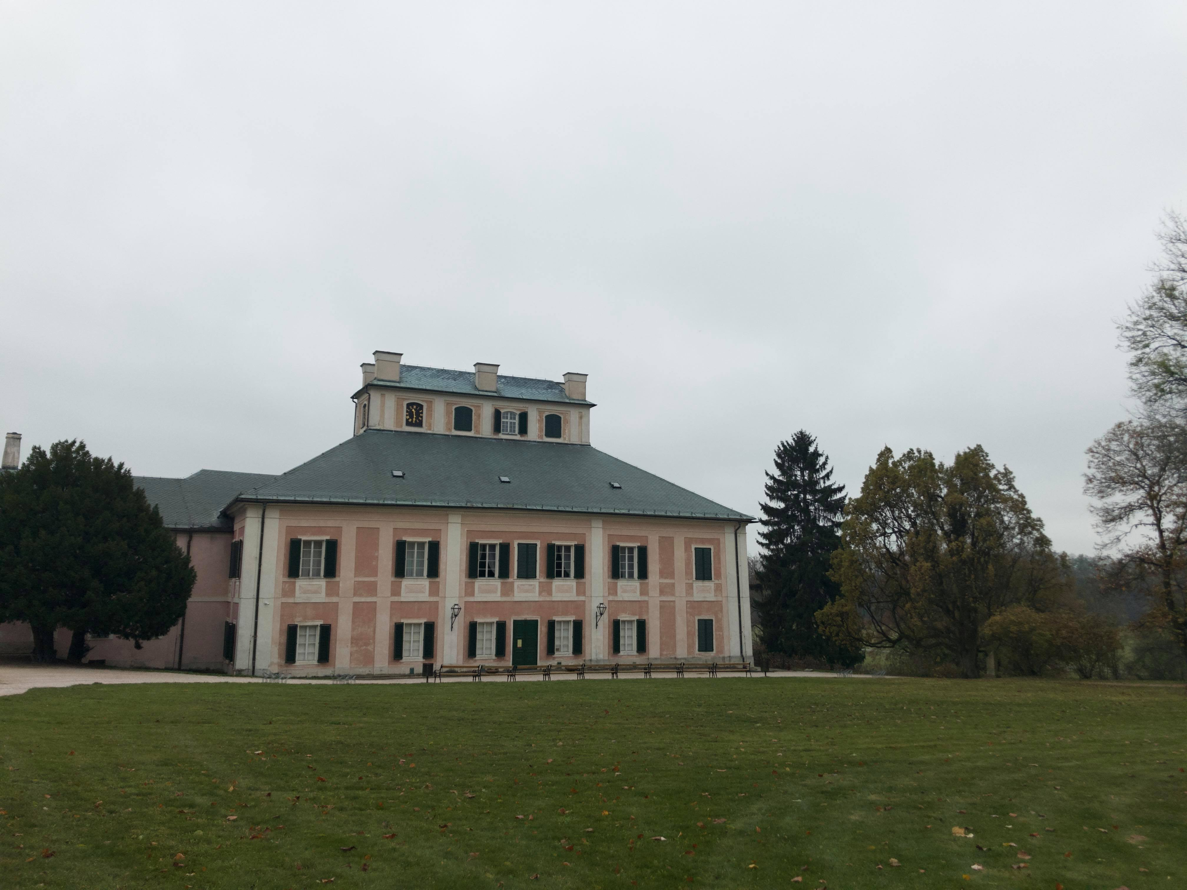 NPP Babiččino údolí, zámek